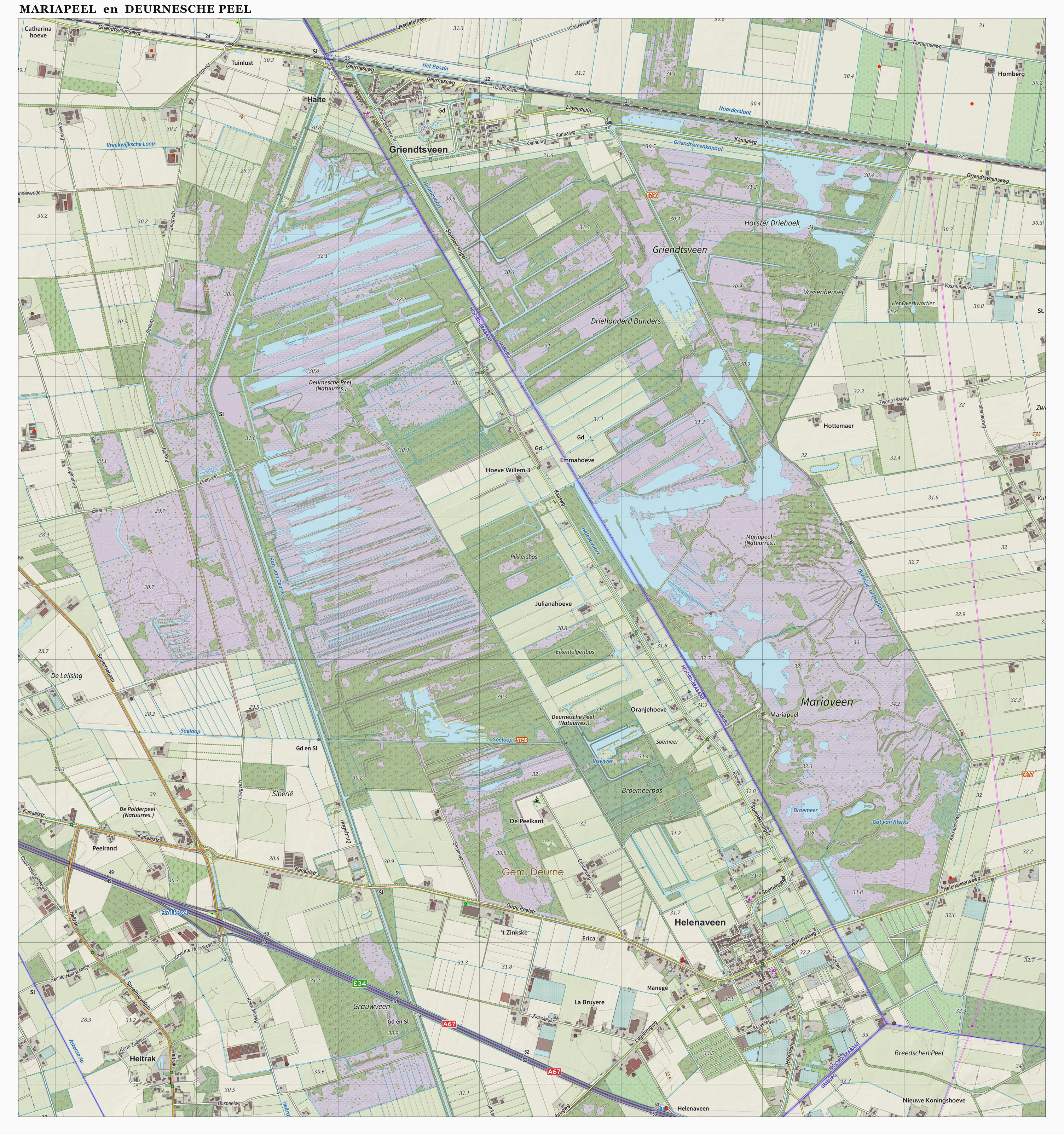 Topografische kaart van de Peel (natuurgebied). Resolutie: 400 pixels/km. Samengesteld door Jan-Willem van Aalst op basis van de GML open geodata van de BRT/Top10NL (basisregistratie Topografie, Kadaster), vrijgegeven door Kadaster onder de Creative Commons BY licentie. Additionele gegevens uit BAG uit de Open Street Map en uit de Risicokaart. Zie ook de Legenda.